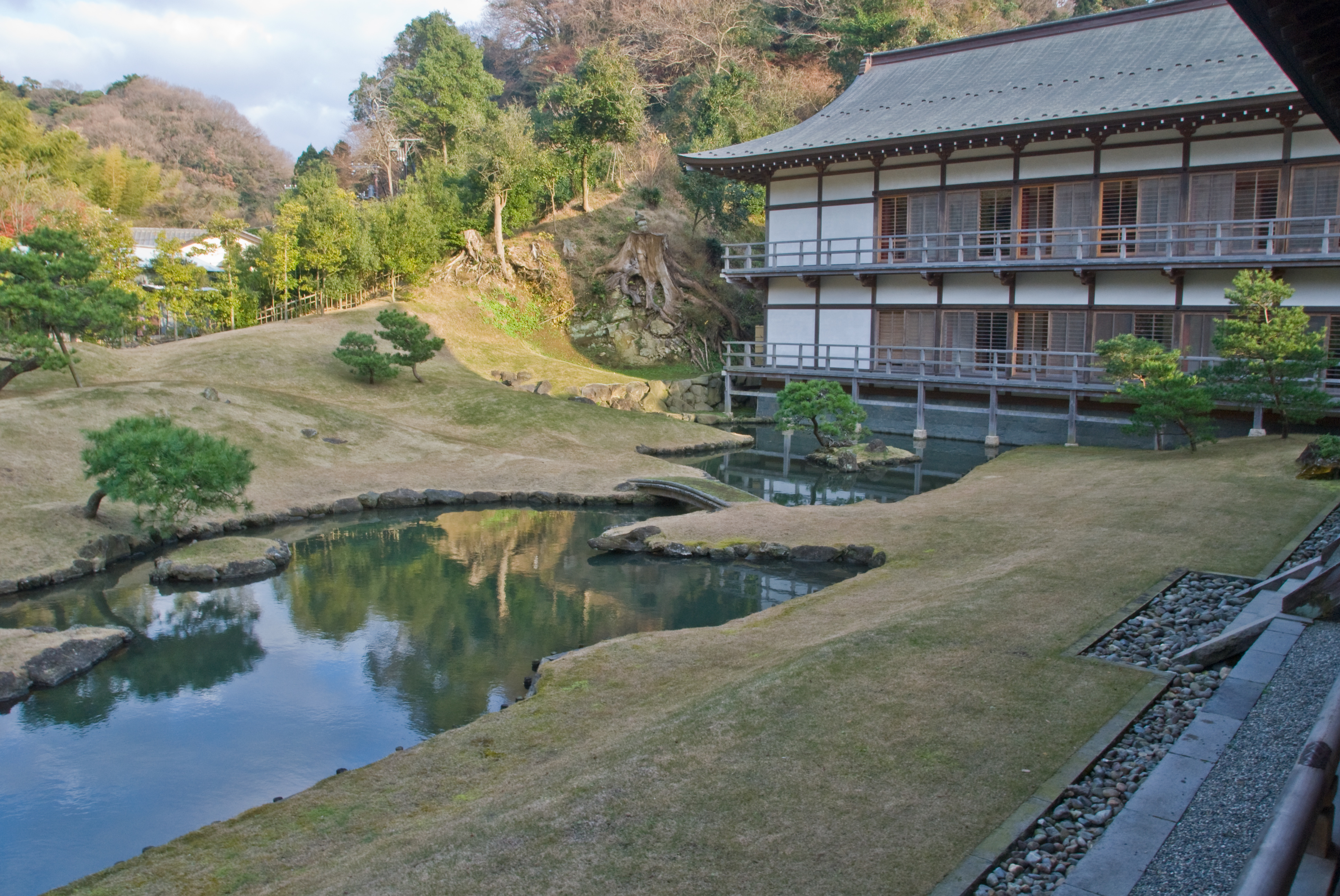 The pond at Kencho-ji, Kamakura.